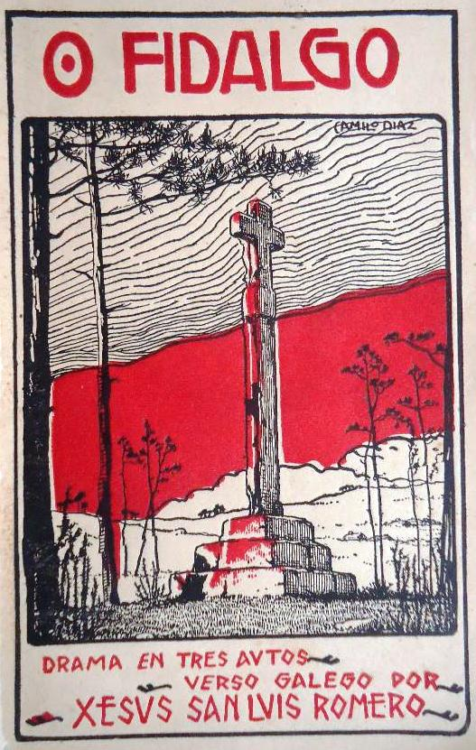 O fidalgo, drama en tres autos, verso galego por Xesús San Luís Romero